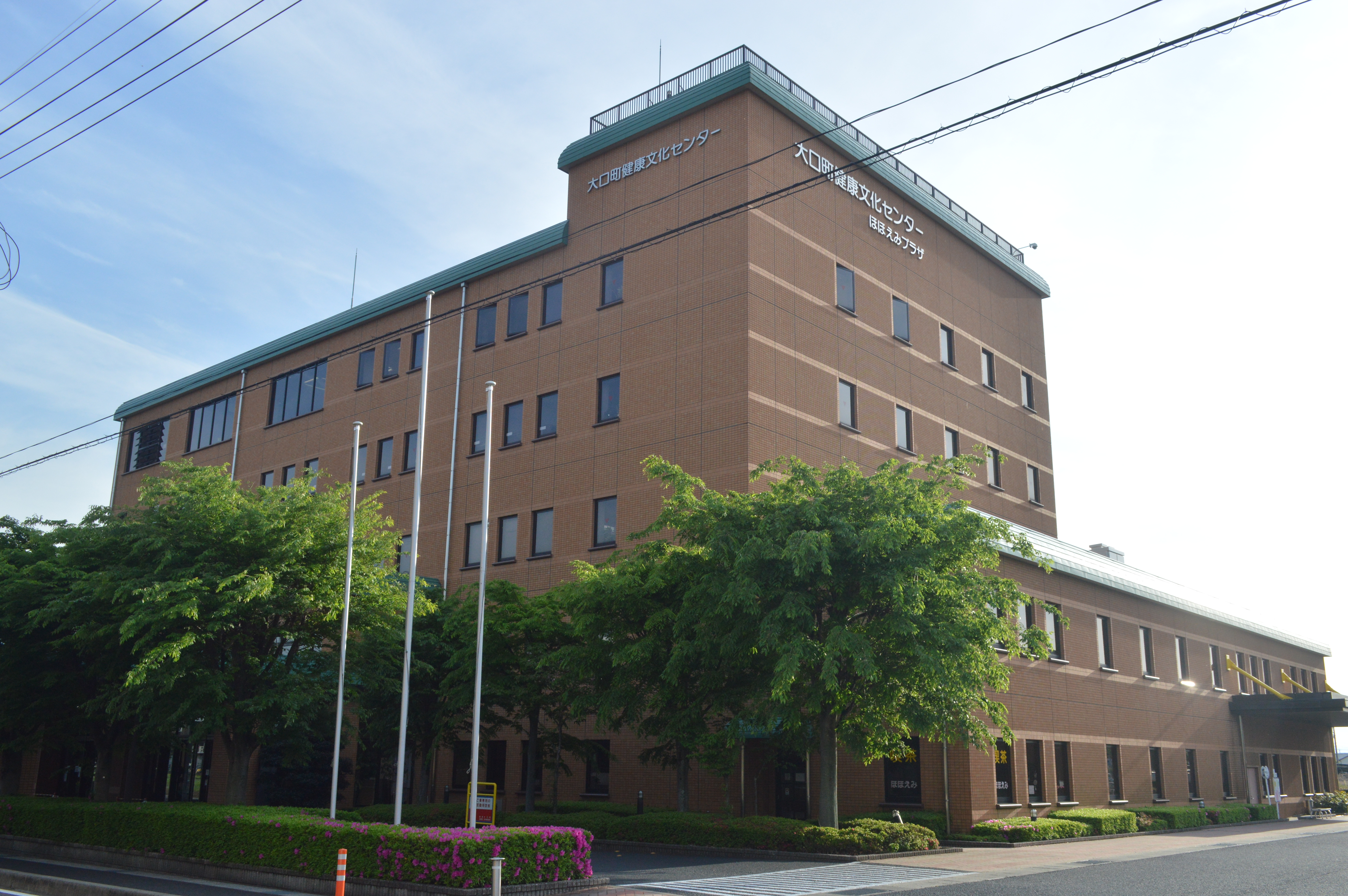 愛知県丹羽郡大口町にある大口町健康文化センター。